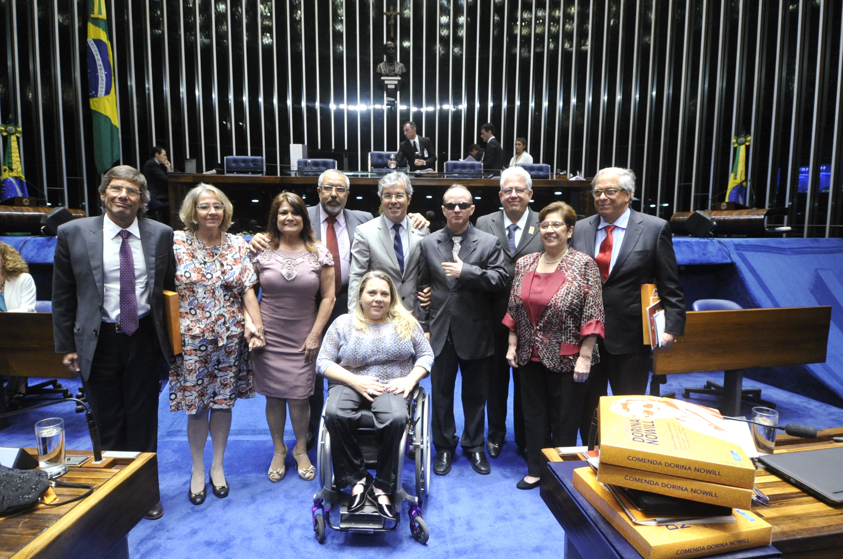 Plenário do Senado durante sessão especial destinada a comemorar o Dia Nacional de Luta das Pessoas com Deficiência e a entrega da Comenda Dorina Gouveia Nowill, em sua 1ª edição. Participam: agraciada Solange Sotelo Pinheiro Calmon; Filho de Dorina Nowill, Cristiano Humberto Nowill; senador Paulo Paim (PT-RS); senador Jorge Viana (PT-AC); ex-deputada, Rosinha da Adefal; filha de Dorina Nowill, Dorina Nowill; agraciada, Aracy Maria da Silva Lêdo. Foto: Geraldo Magela/Agência Senado